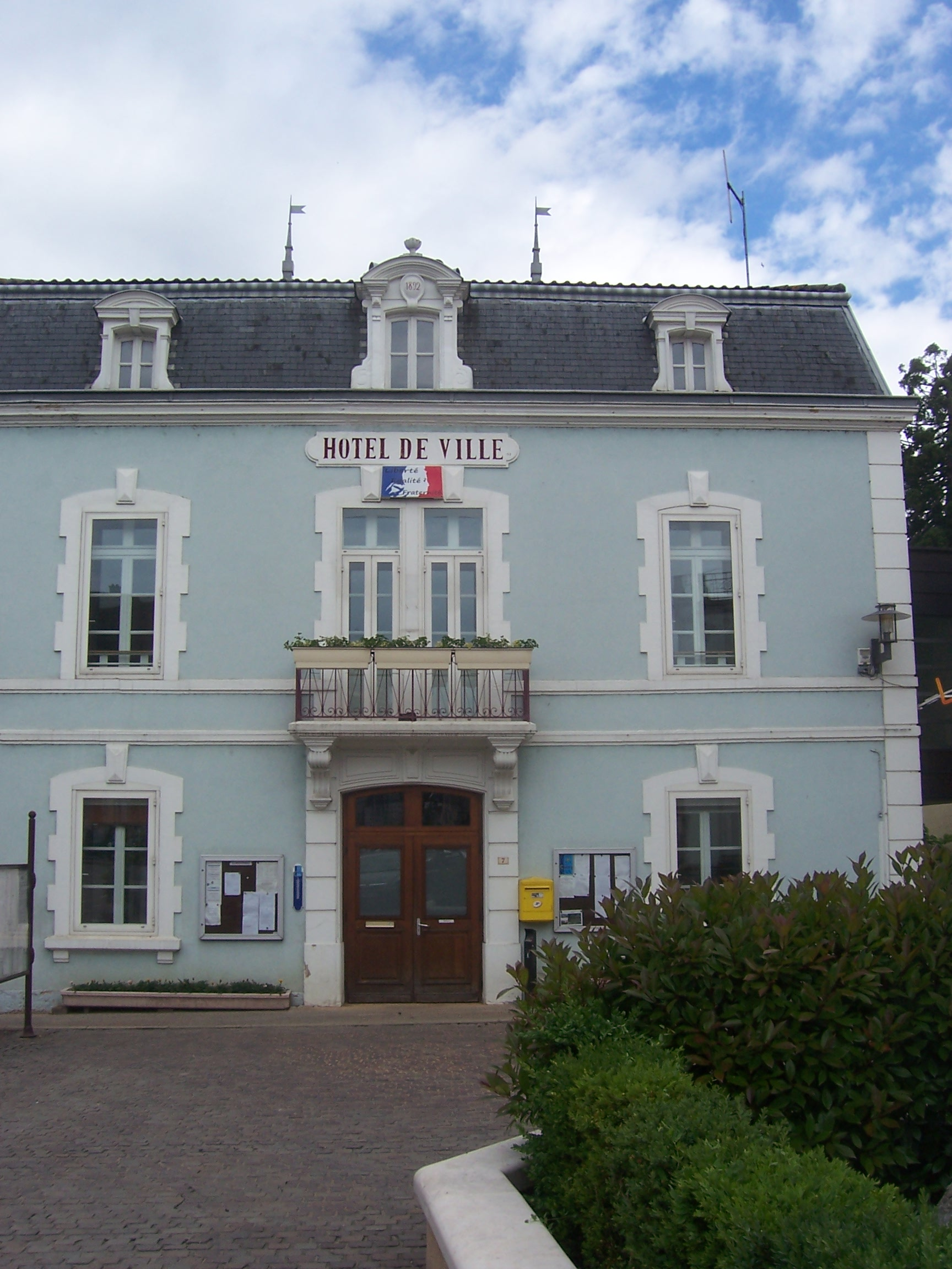 Mairie de Cuisery